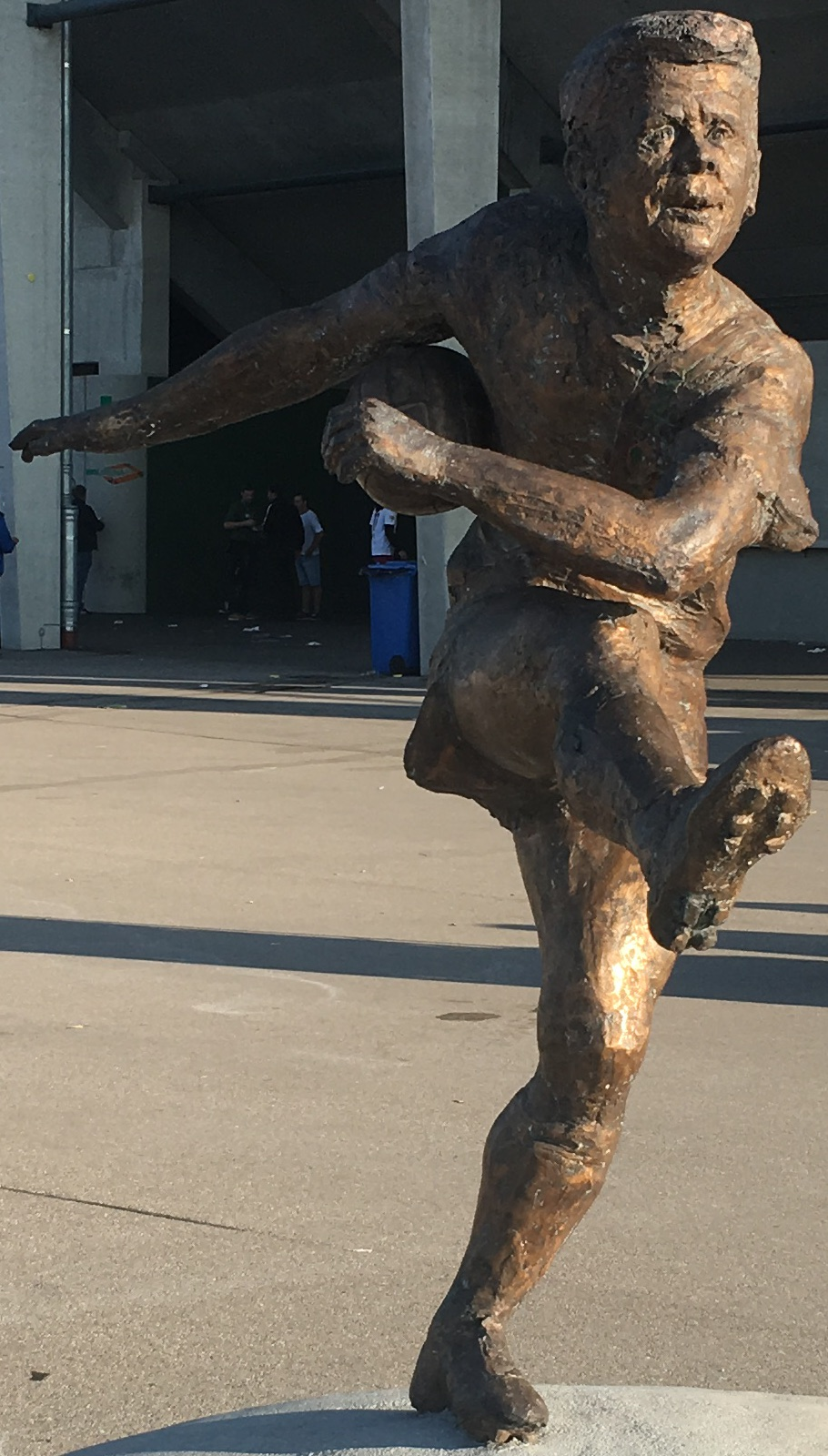 Denkmal für Helmut Haller vor der Augsburg Arena